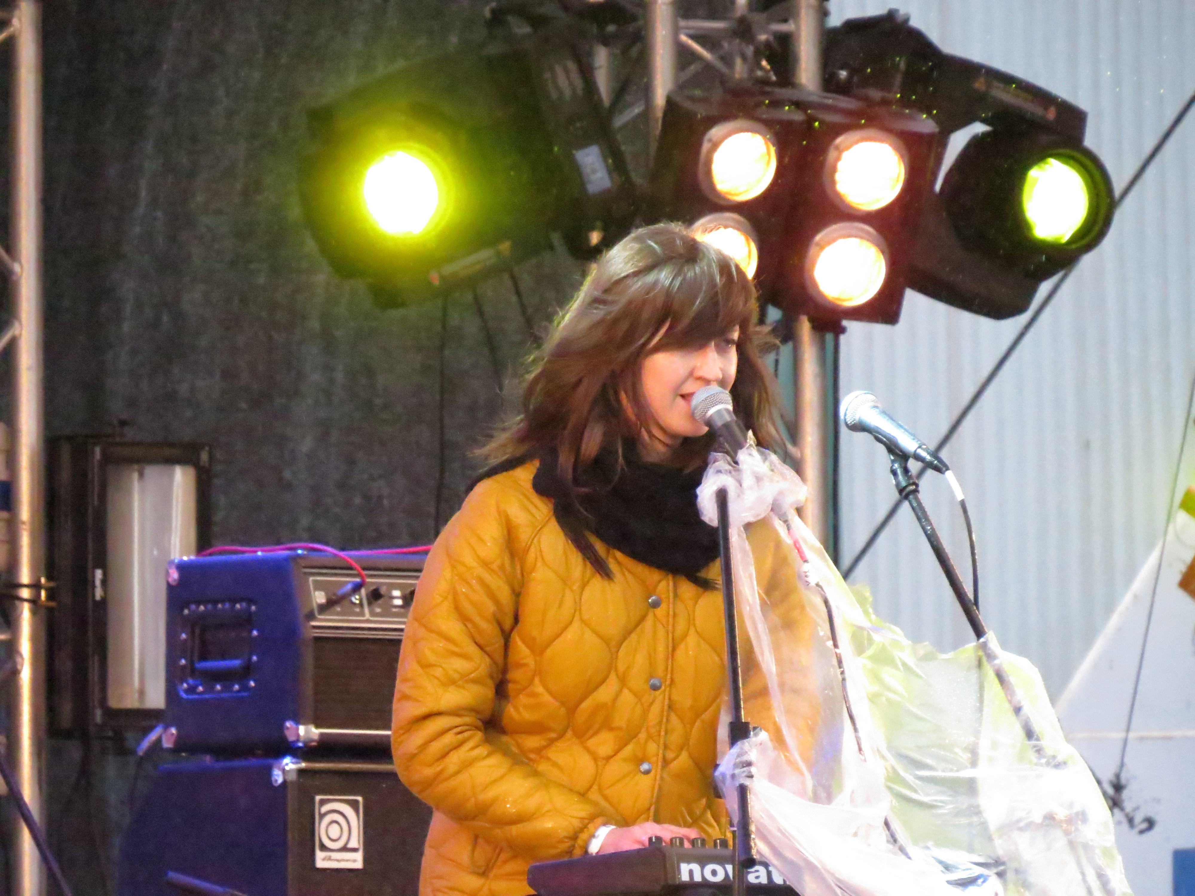 Группа Наадя на концерте-митинге в поддержку кандидата в мэры Москвы Алексея Навального на проспекте Сахарова 6 сентября 2013 года